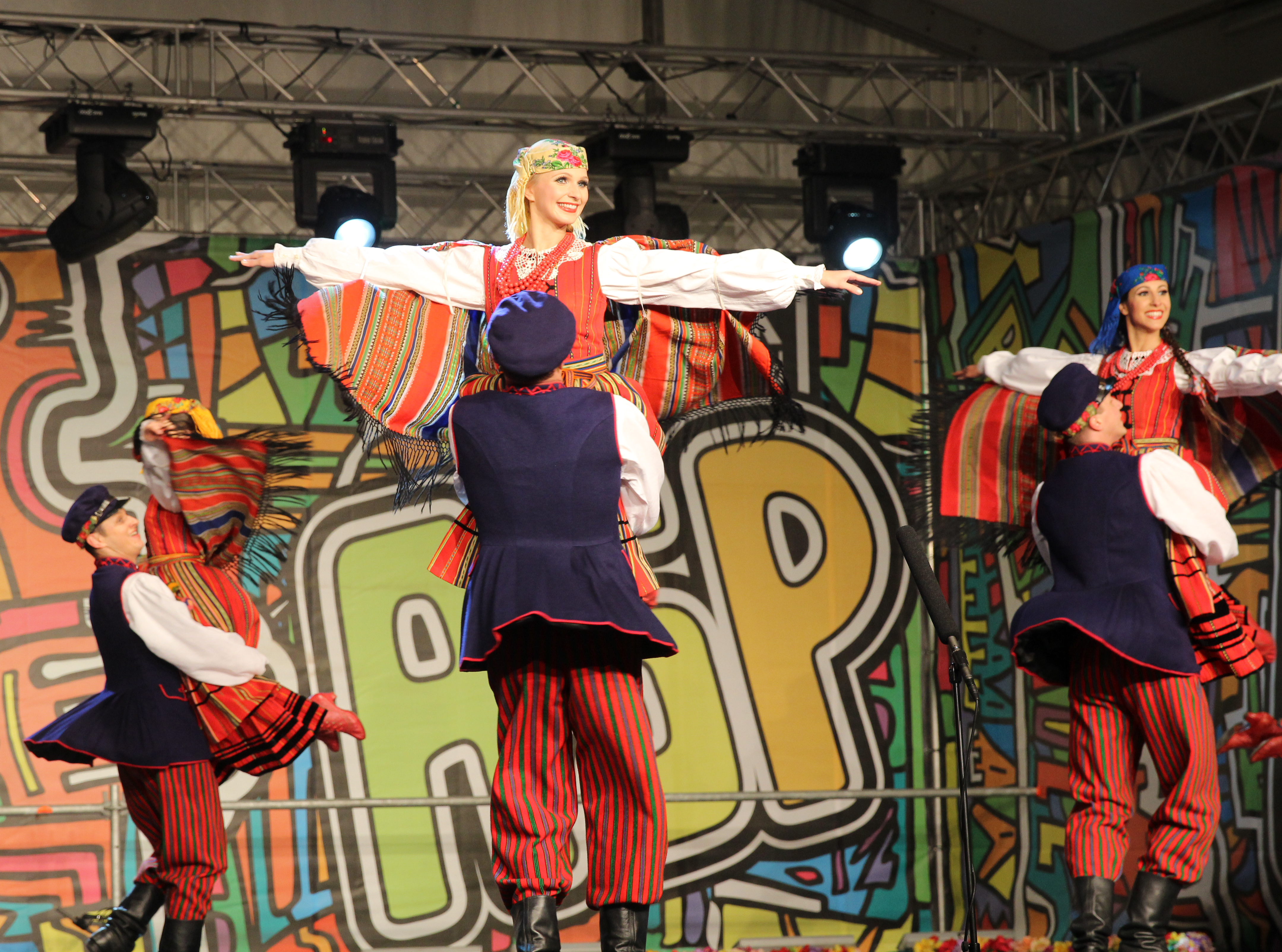 Przystanek Woodstock w 2013 r.